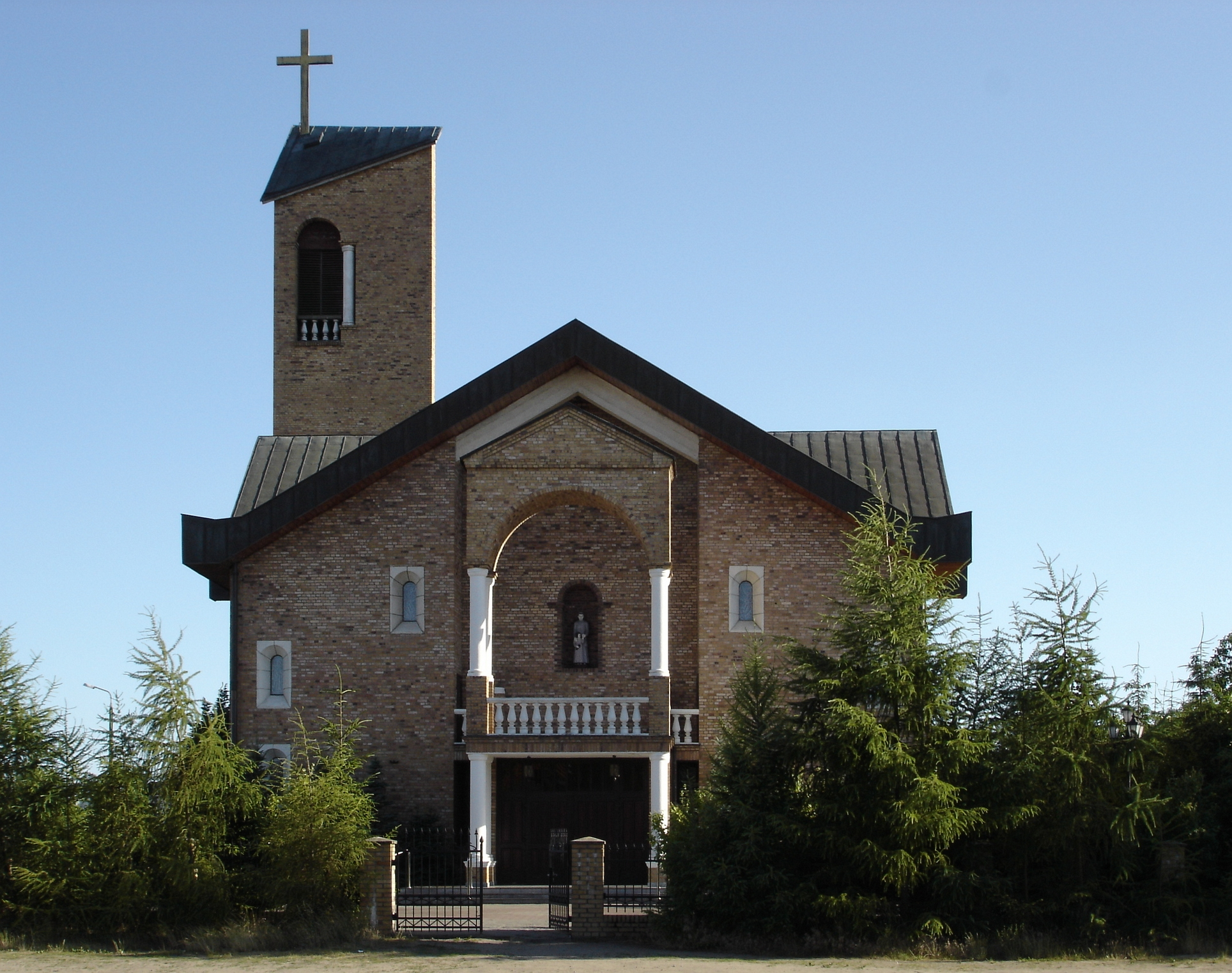 Kościół św. Urszuli Ledóchowskiej w Bydgoszczy.